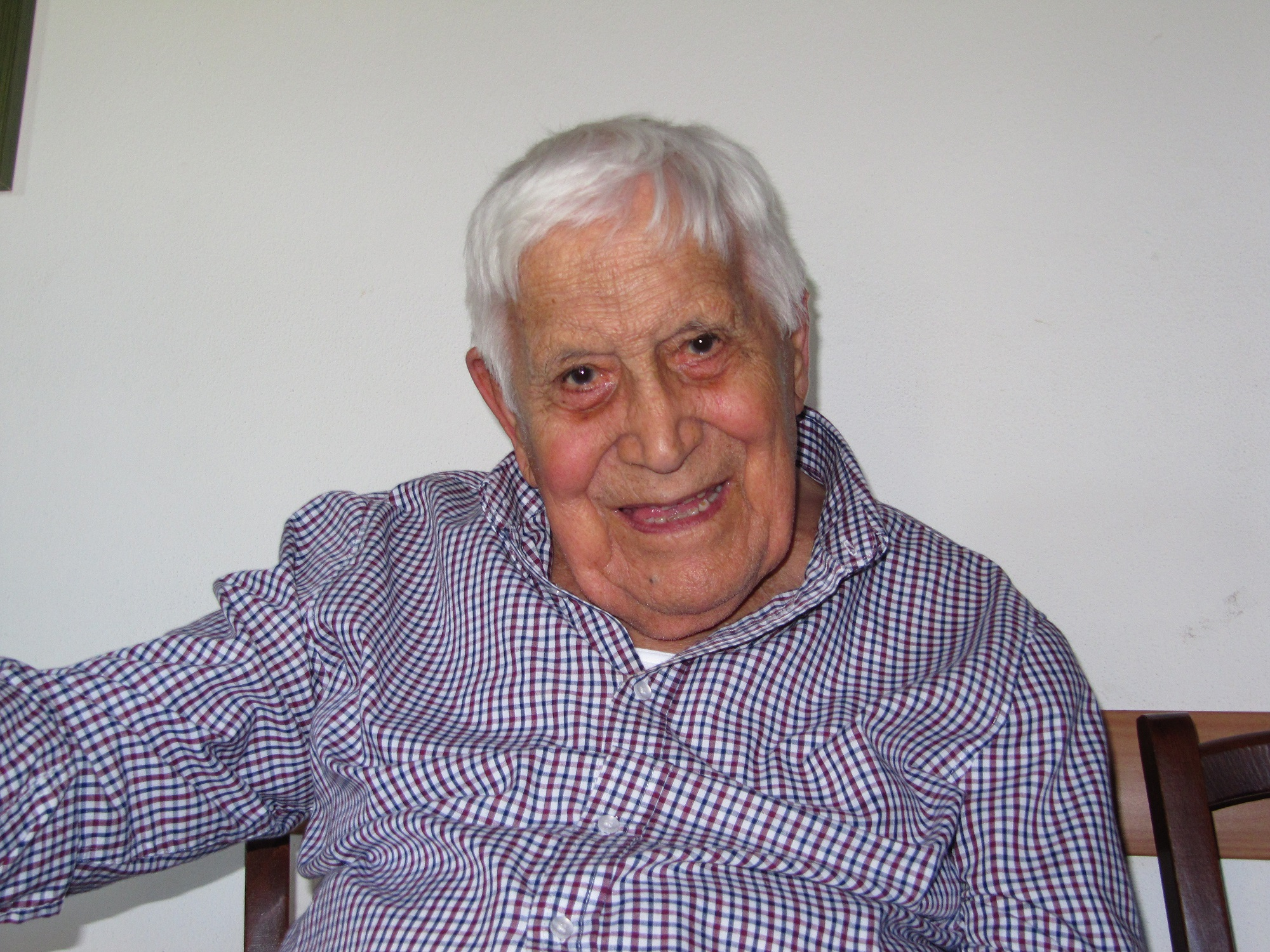 Arturo Paoli